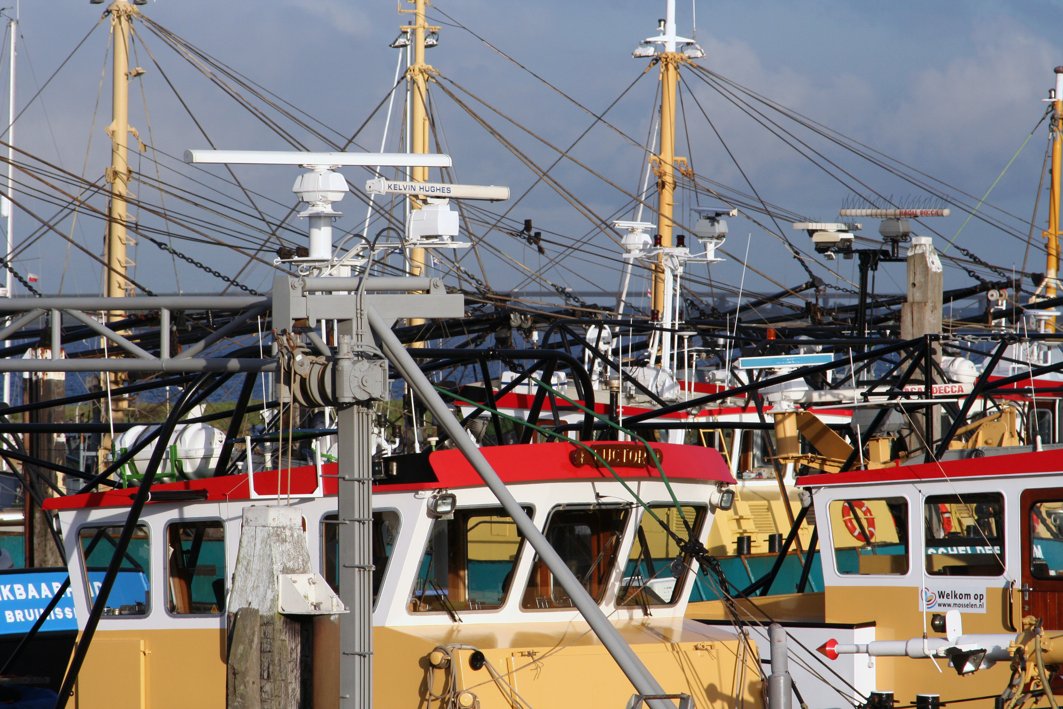 Fischerschiffe in Bruinisse